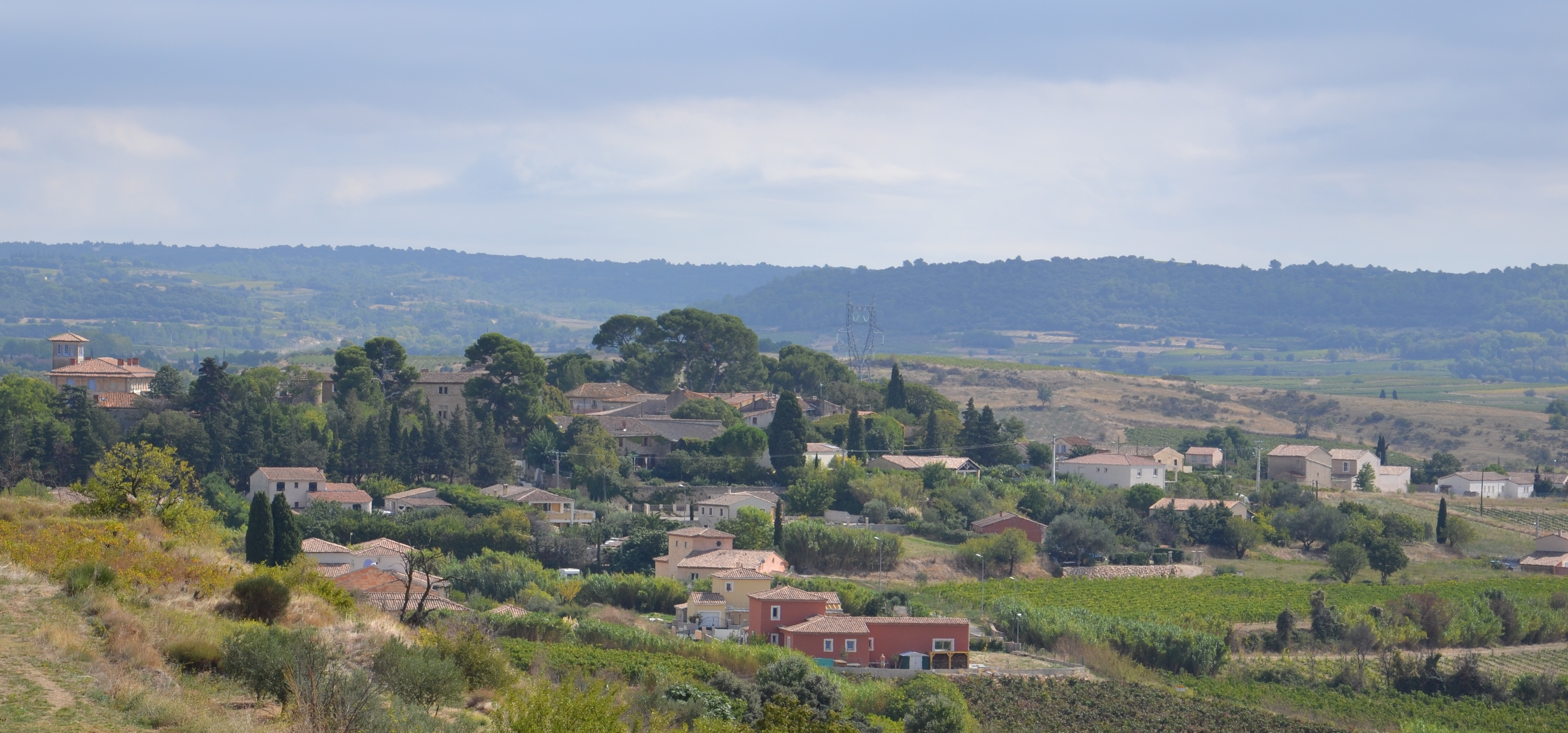 Puilacher, Hérault.